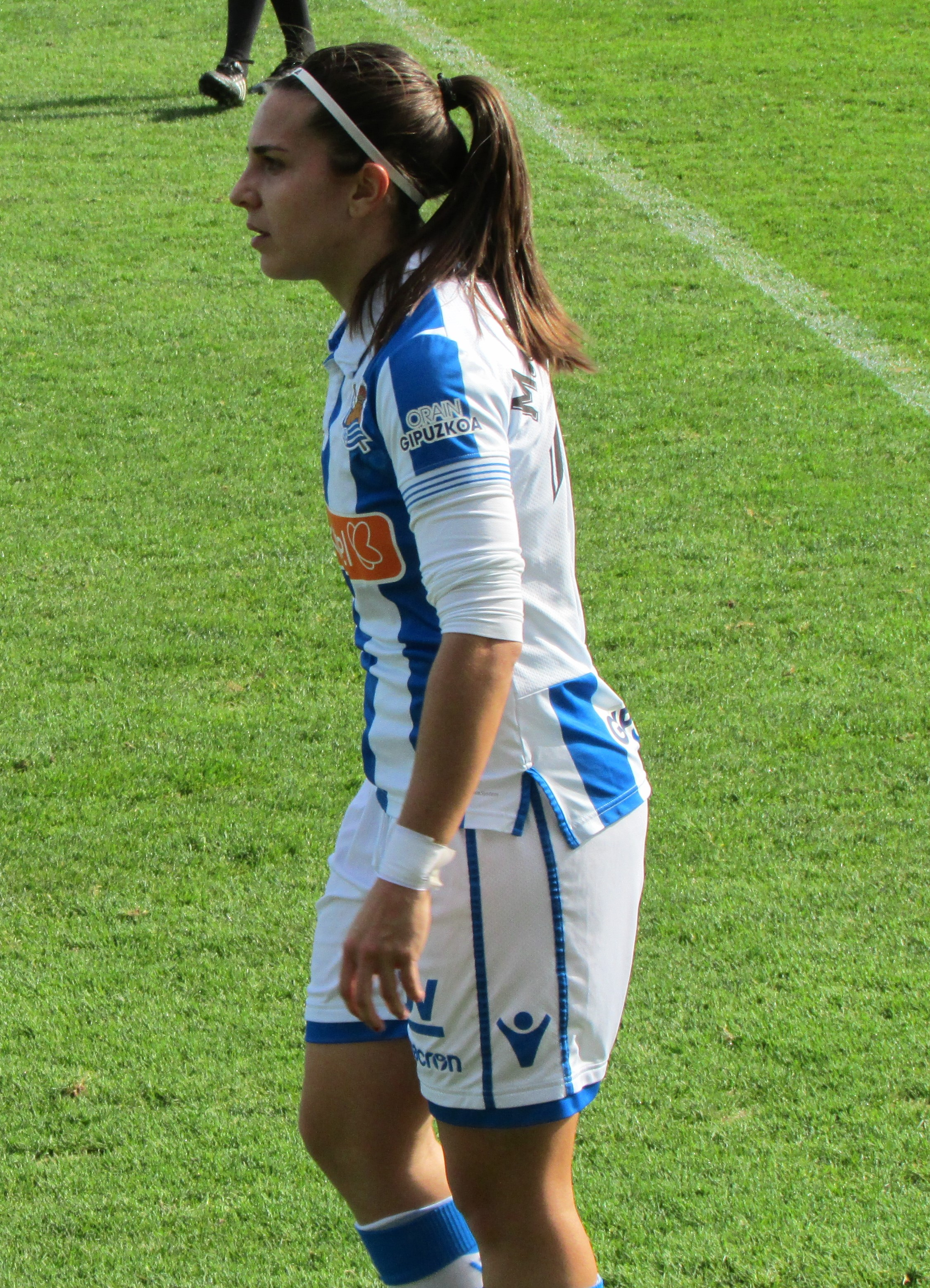 futbolista